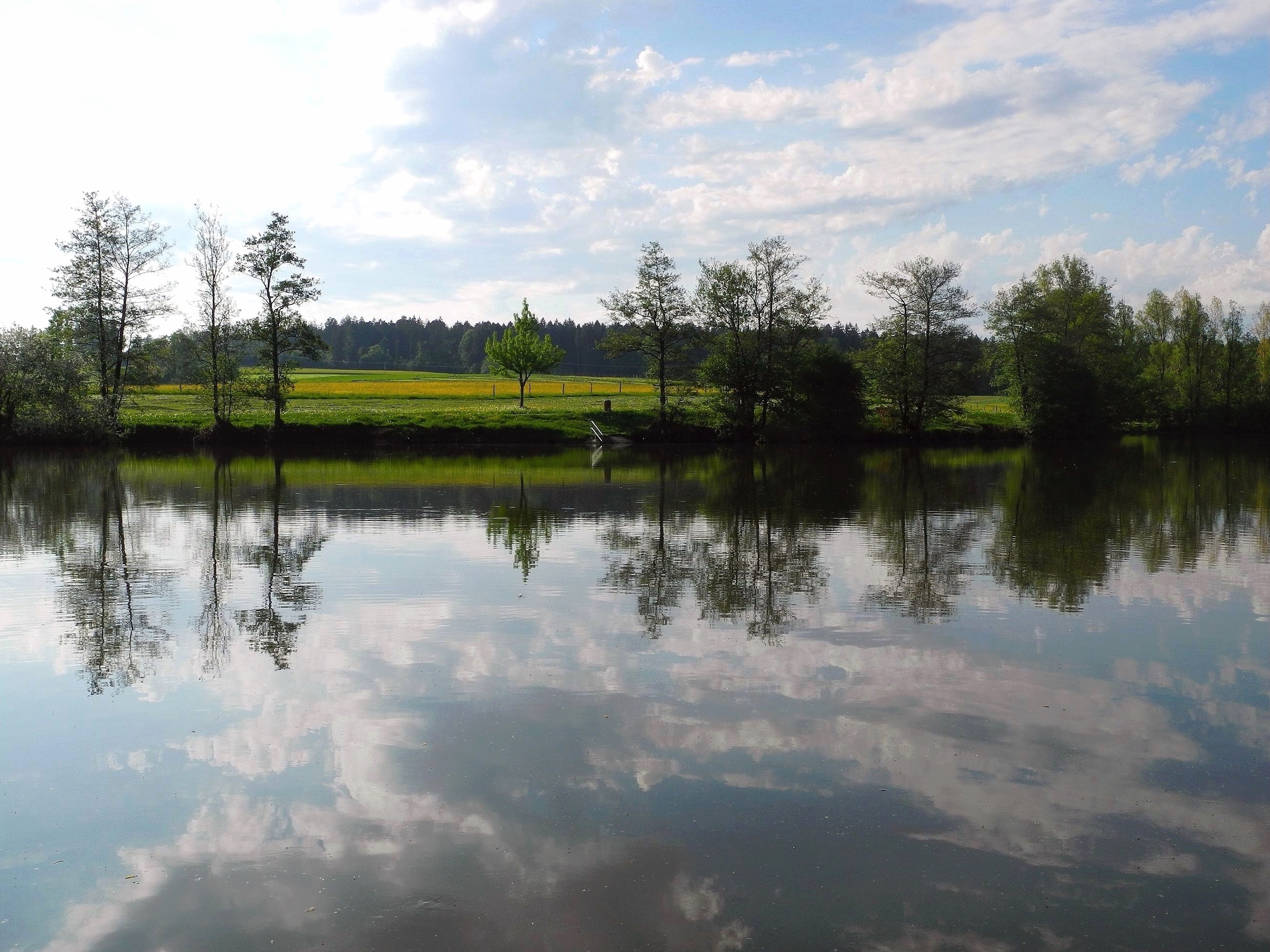 Abends am Aichstrutsee, einem Badesee bei Welzheim